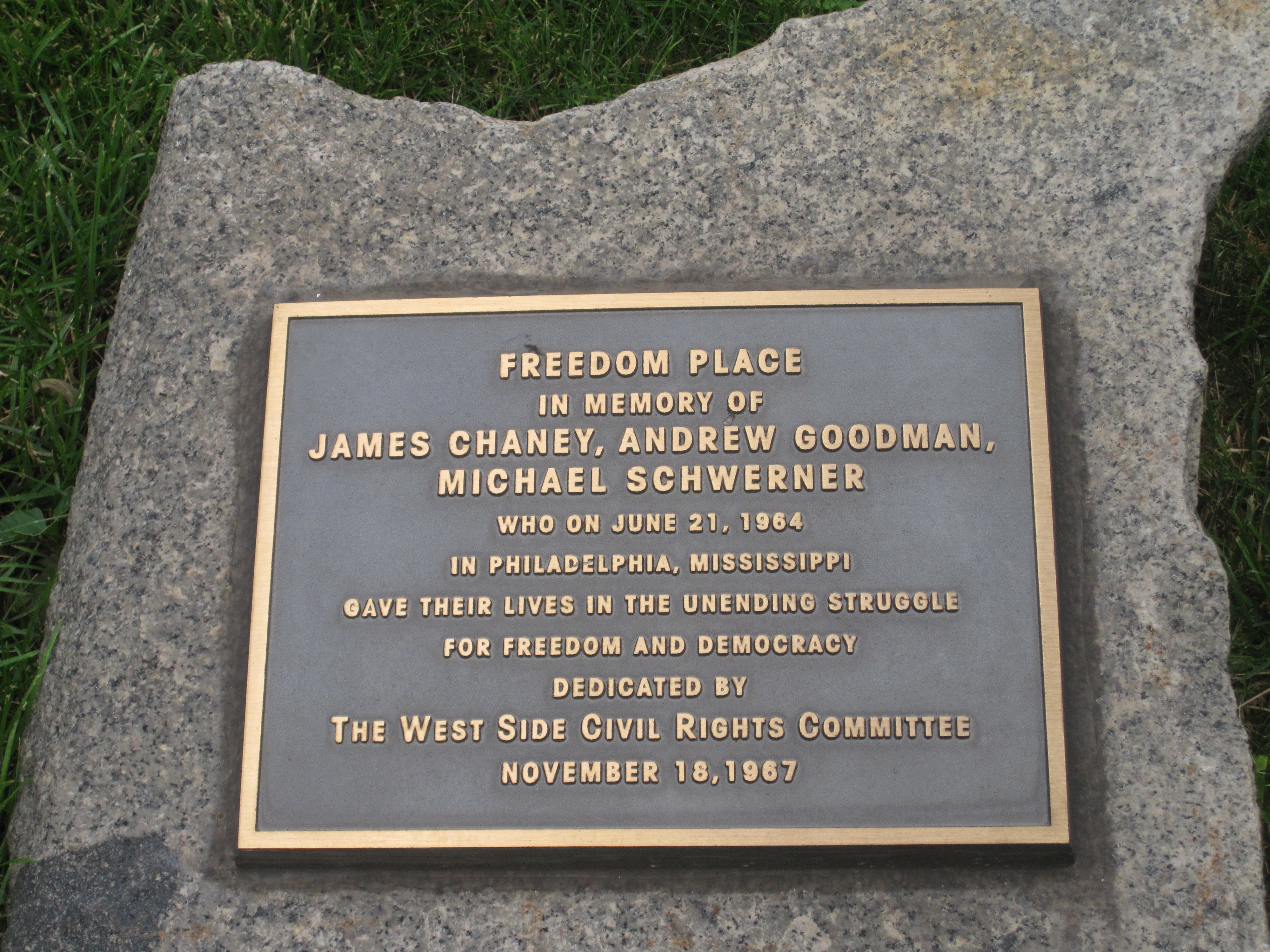 Plaque about murders in Mississippi